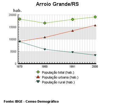 Grafico com aevolução demografica de Arroio Grande/RS